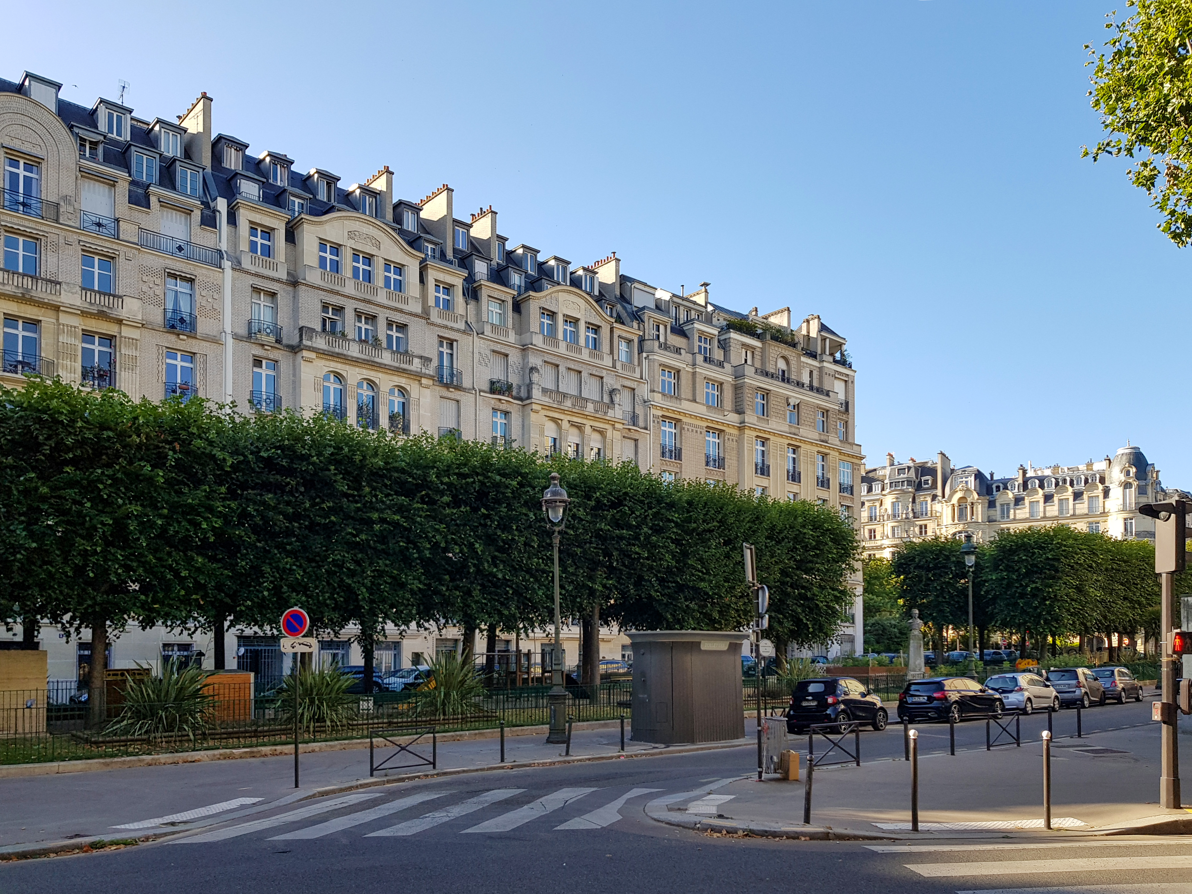 Immeubles du square Lamartine, côté est, Paris 16e.